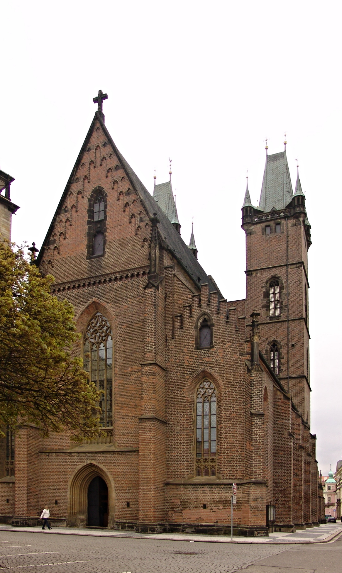 Kostel sv. Ducha, katedrální (Hradec Králové), Velké nám., Hradec Králové, Hradec Králové.